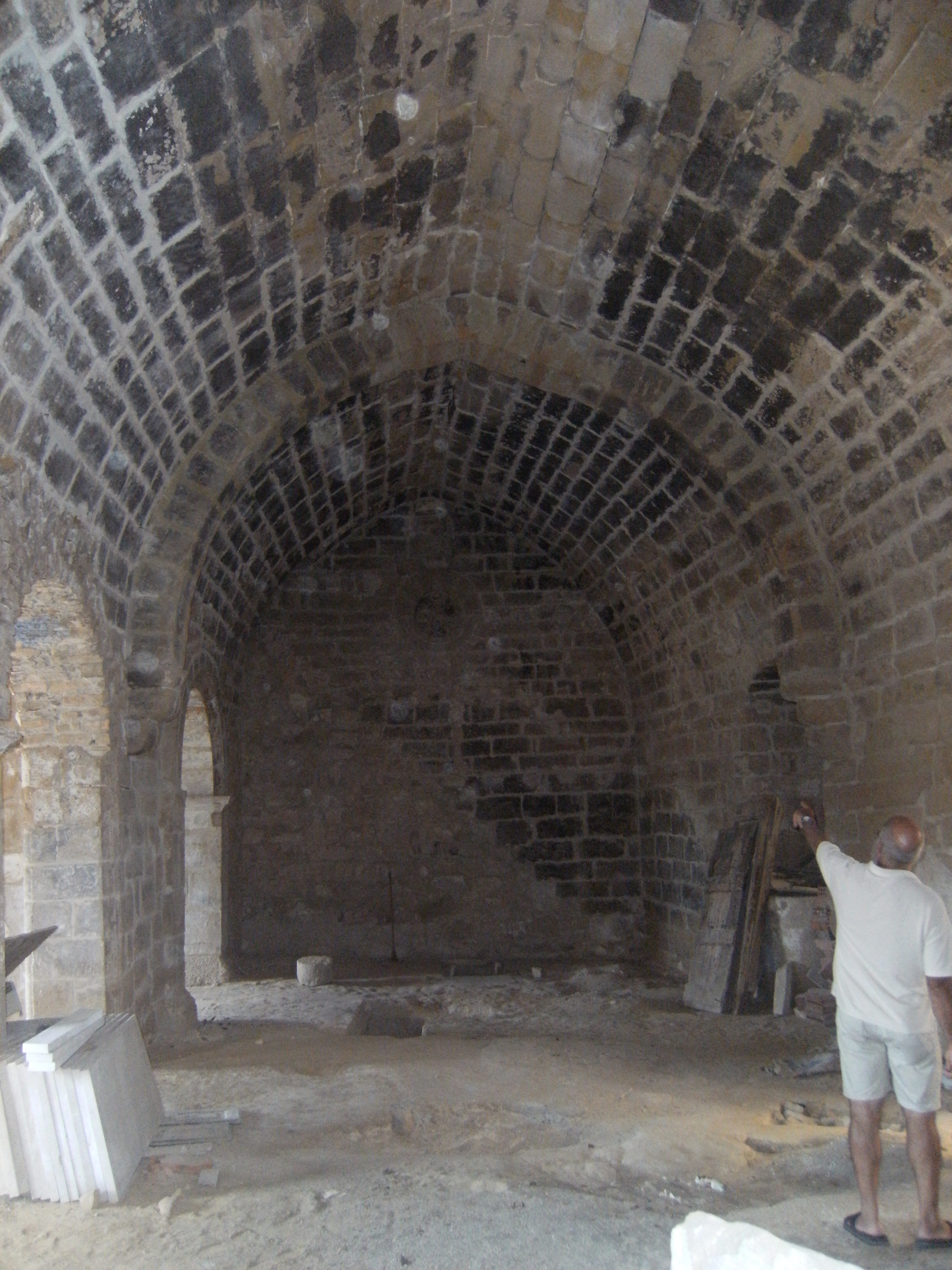 Nave principal, de estilo románico